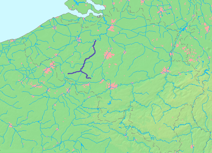 Kaart van de Dender op basis van Wikimedia Commons kaart MapBelgiumWater